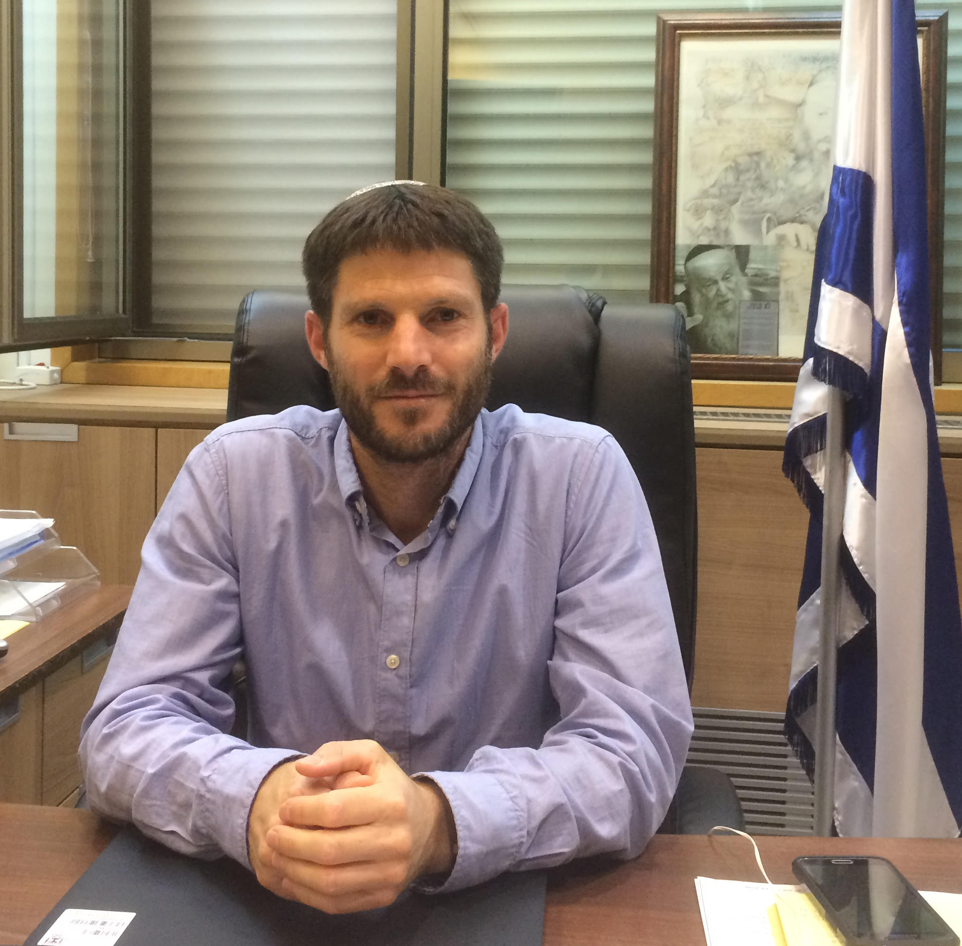 ח"כ בצלאל סמוטריץ'